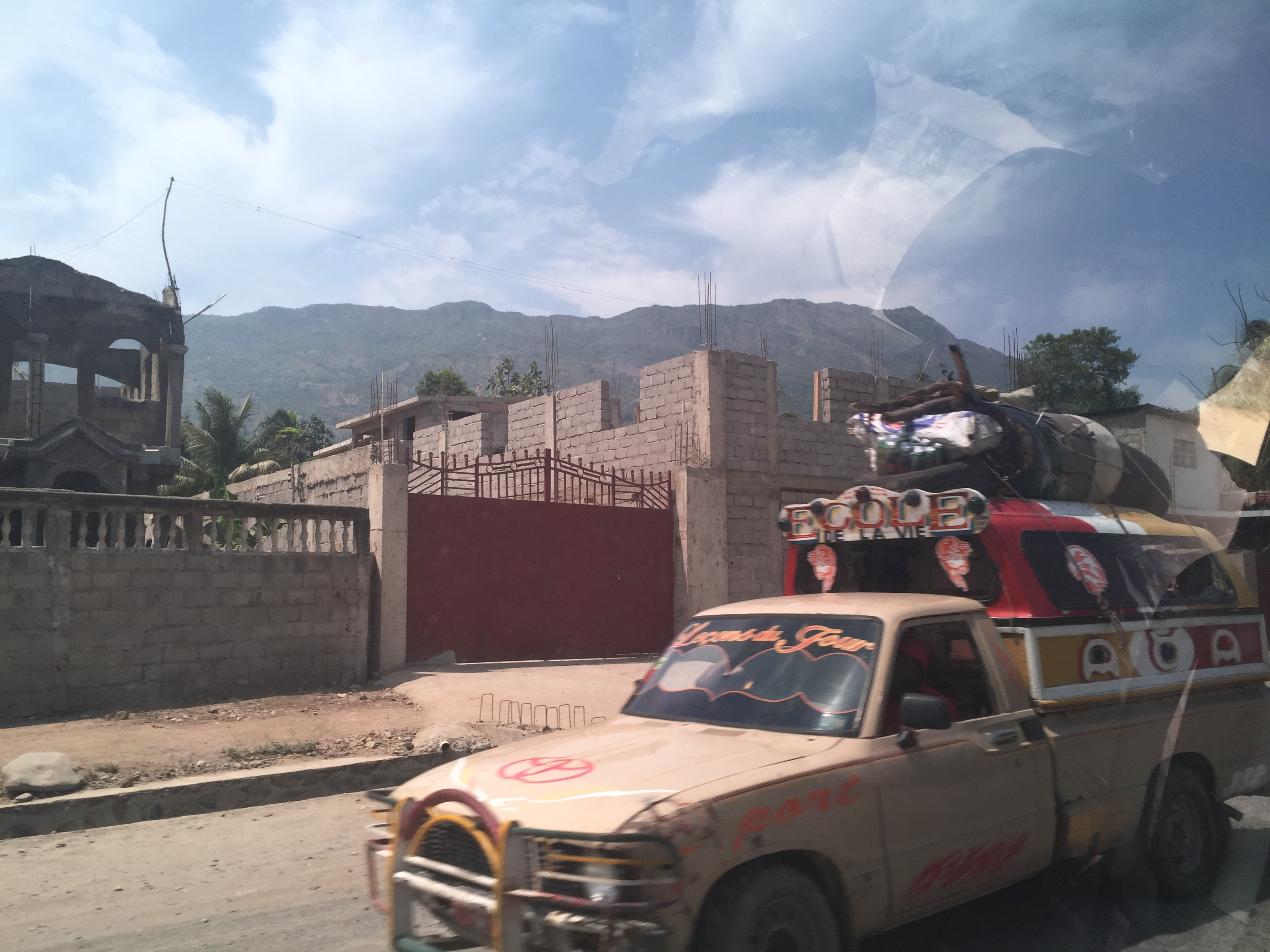 Vaudreuil, Haiti